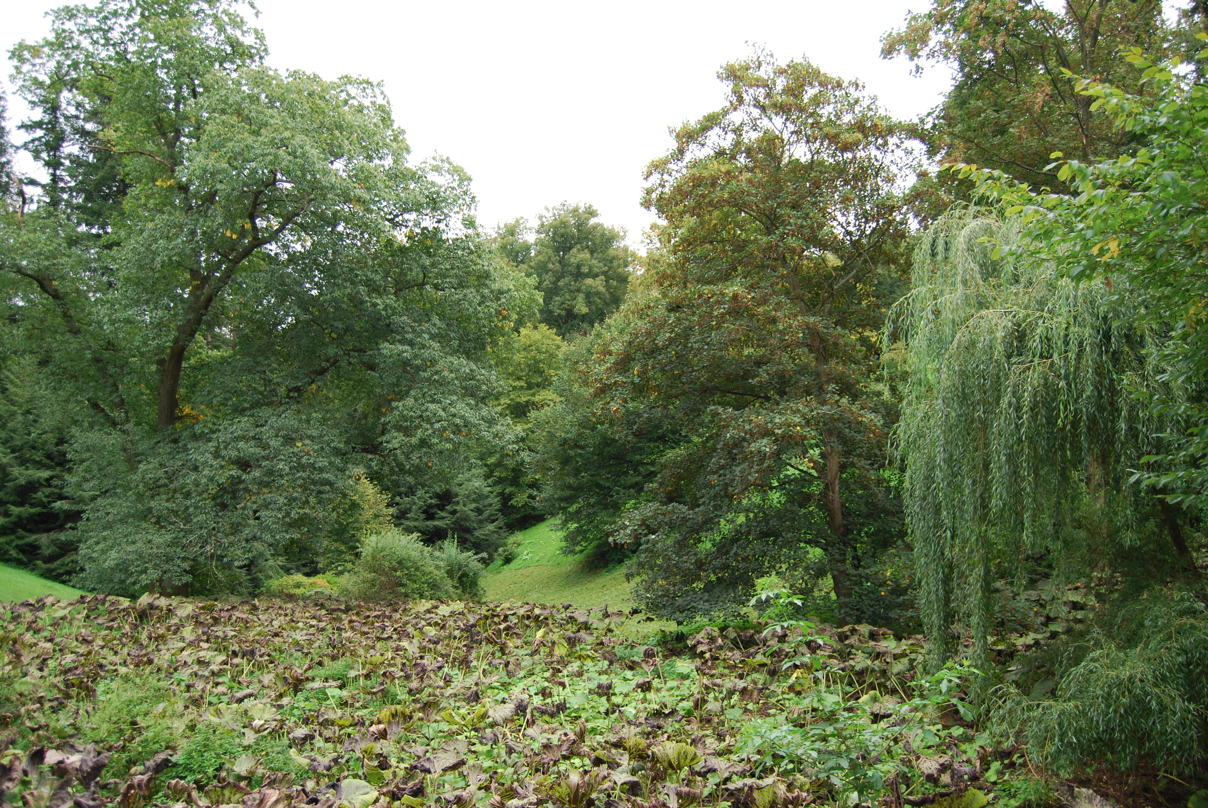 Zámecký park.Orlík nad Vltavou.Okres Písek.Česko.